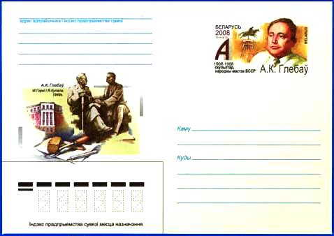 Конверт с оригинальной маркой Республики Беларусь от 22 мая 2008 г. № 80 - 100 лет со дня рождения А.К. Глебова. Иллюстрация: А. К. Глебов. "Максим Горький и Янка Купала". 1949 г. (на бел. яз.). Скульптурная композиция, инструменты скульптора.